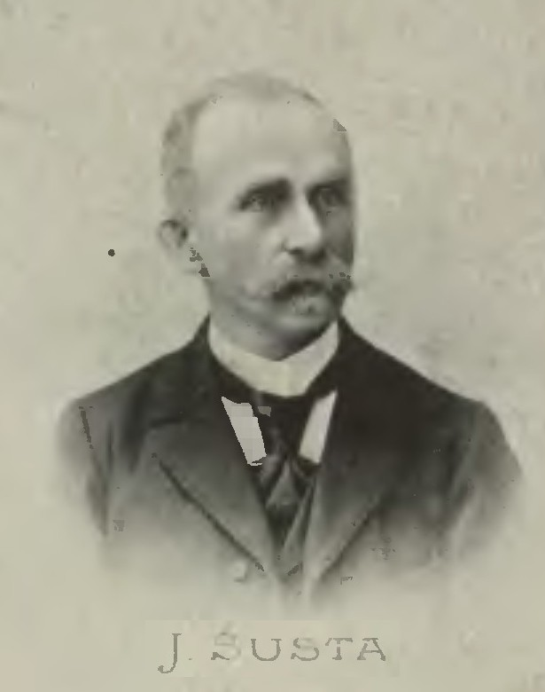 Portrét – Josef Šusta (1835 - 1914), Český rybníkář.